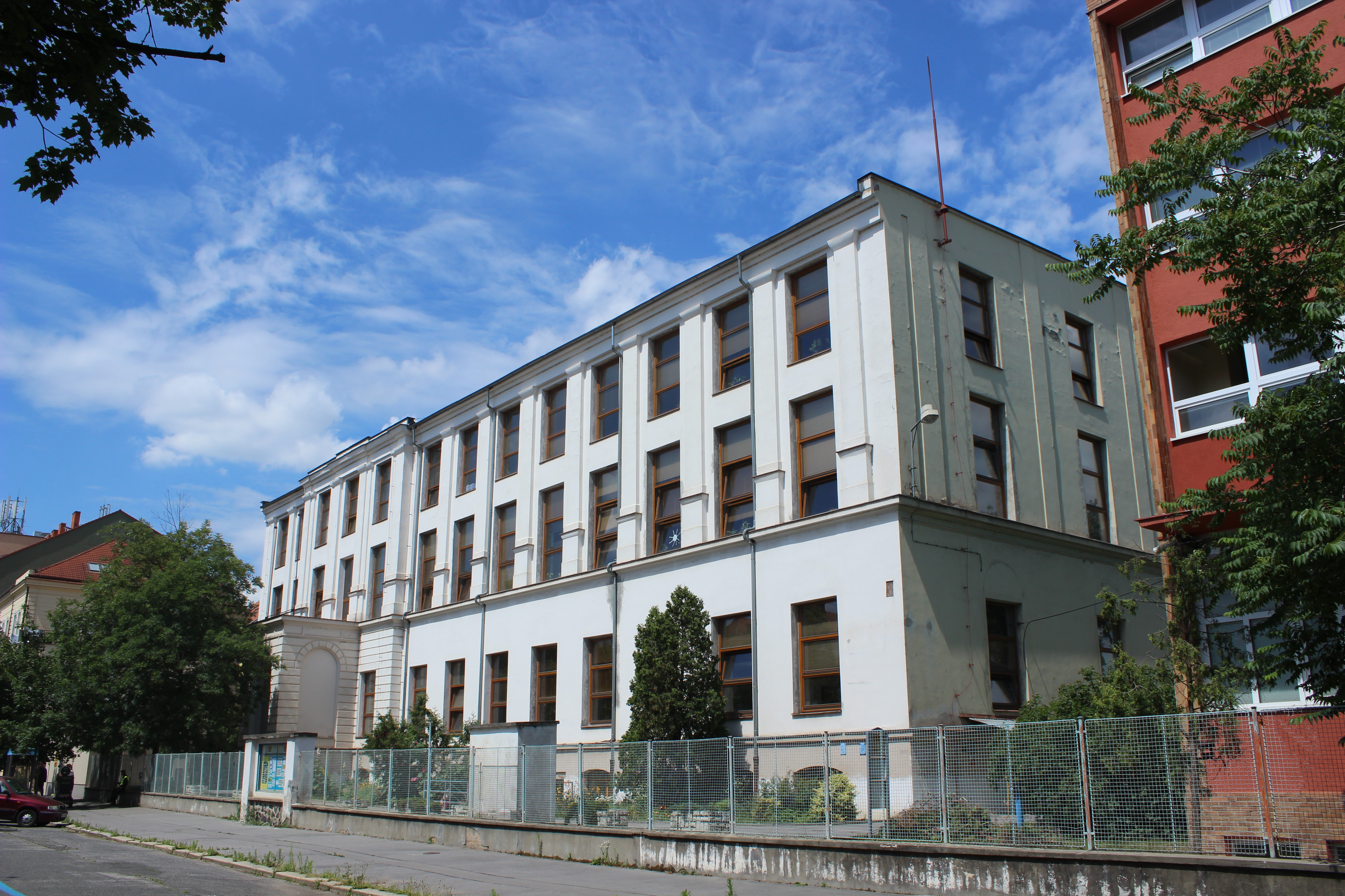 Objekt Poštovní tiskárny cenin na Ortenově náměstí v pražských Holešovicích.